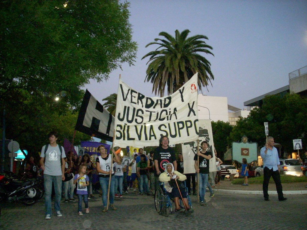 Marcha en Rafaela (Sta Fe, Argentina) para exigir Verdad y Justicia por Silvia Suppo 29-03-15